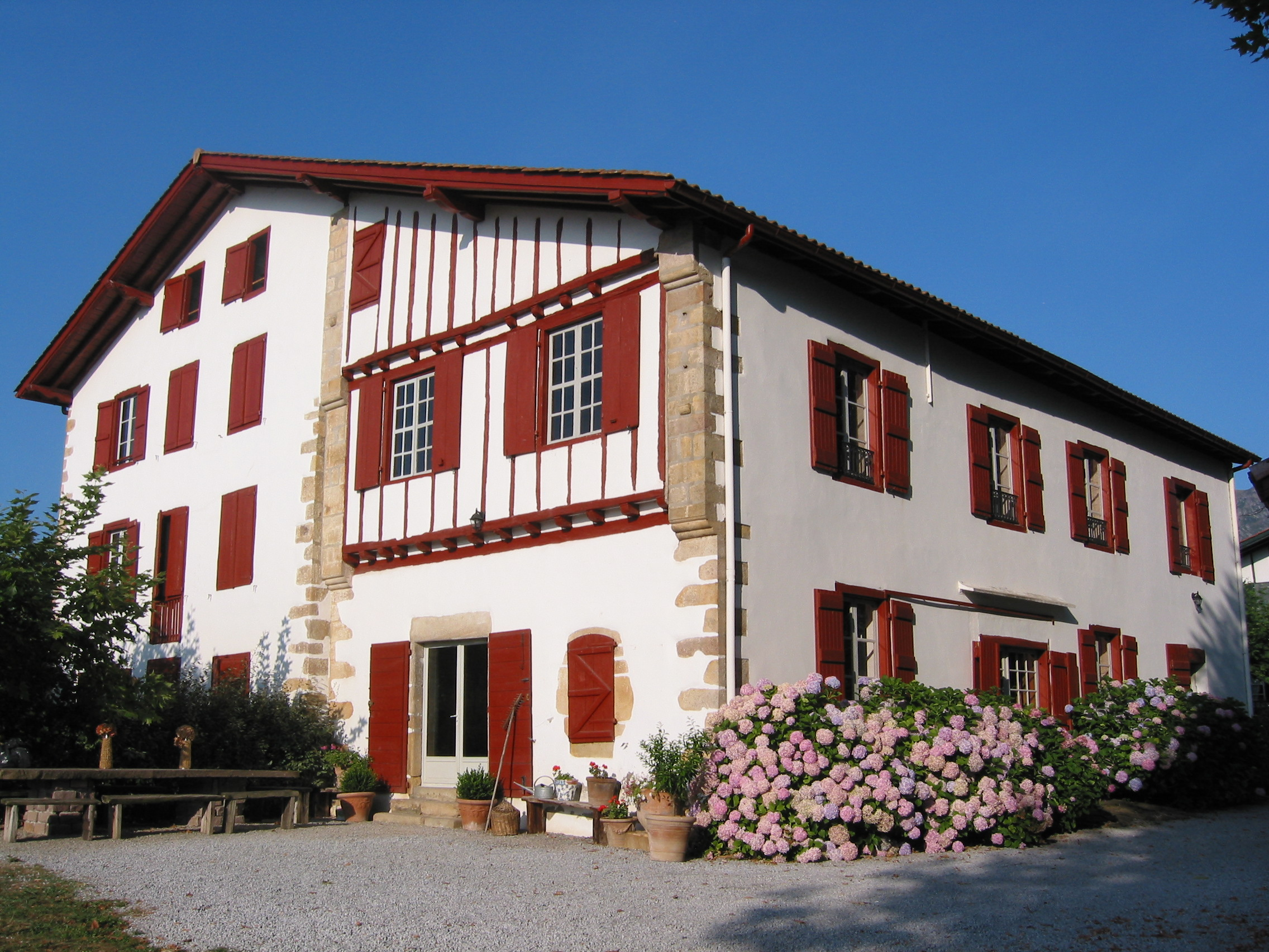 Sare (France), Chalet français. Photo prise le 24/07/05 par Harrieta171